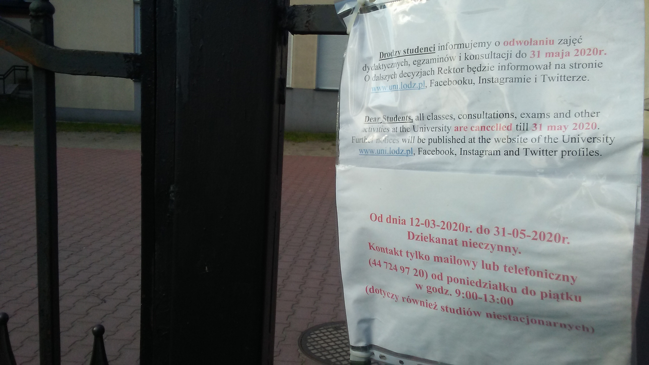 Infofmacja o zamknięciu Uniwerystetu Łódzkiego podczas pandemii SARS-CoV-2